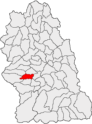 Categorie:Hărţi ale judeţului Hunedoara